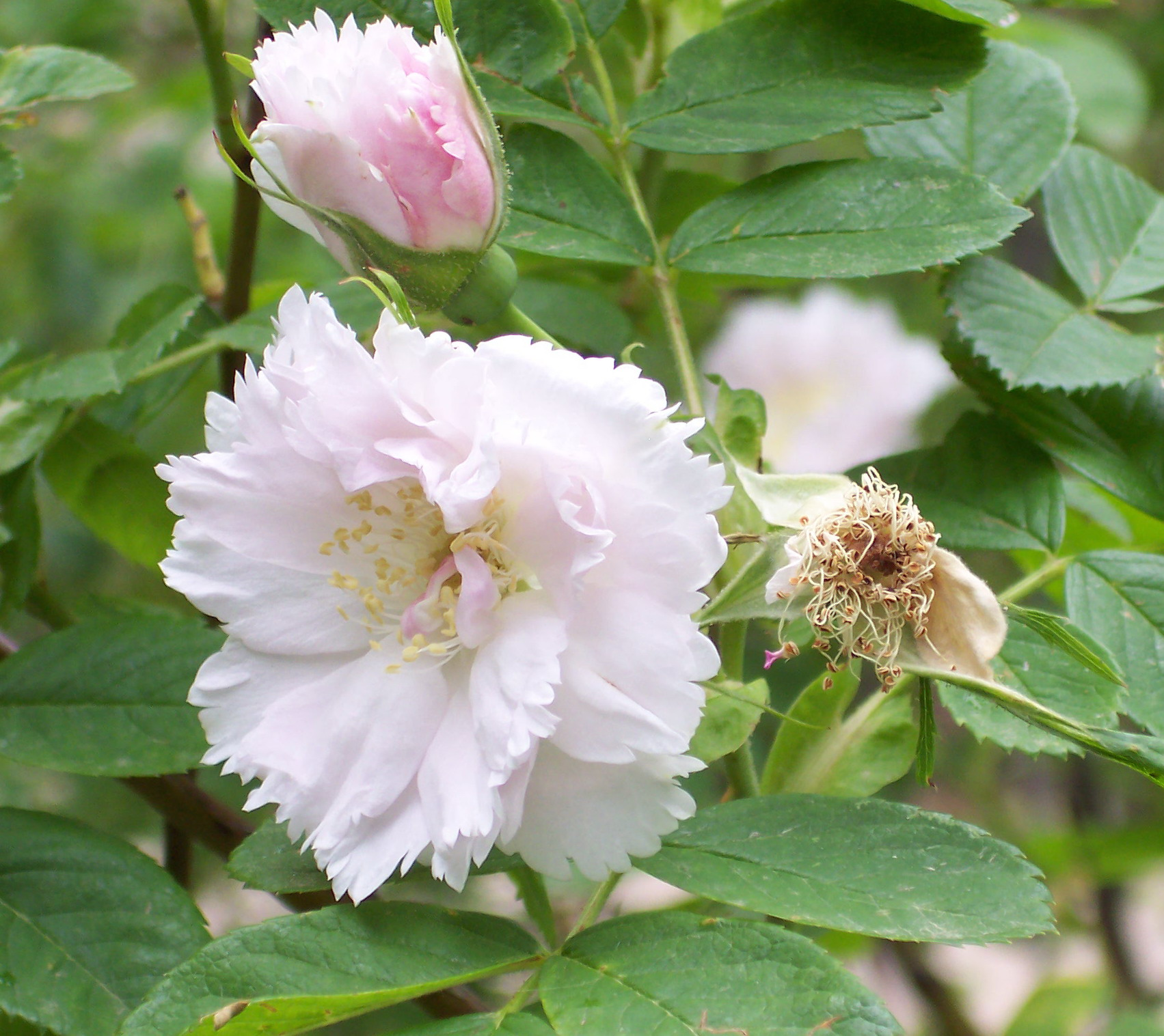 Rosa 'Fimbriata', hybr. Rugosa, sect. Cassiorhodon. Real Jardín Botánico, Madrid